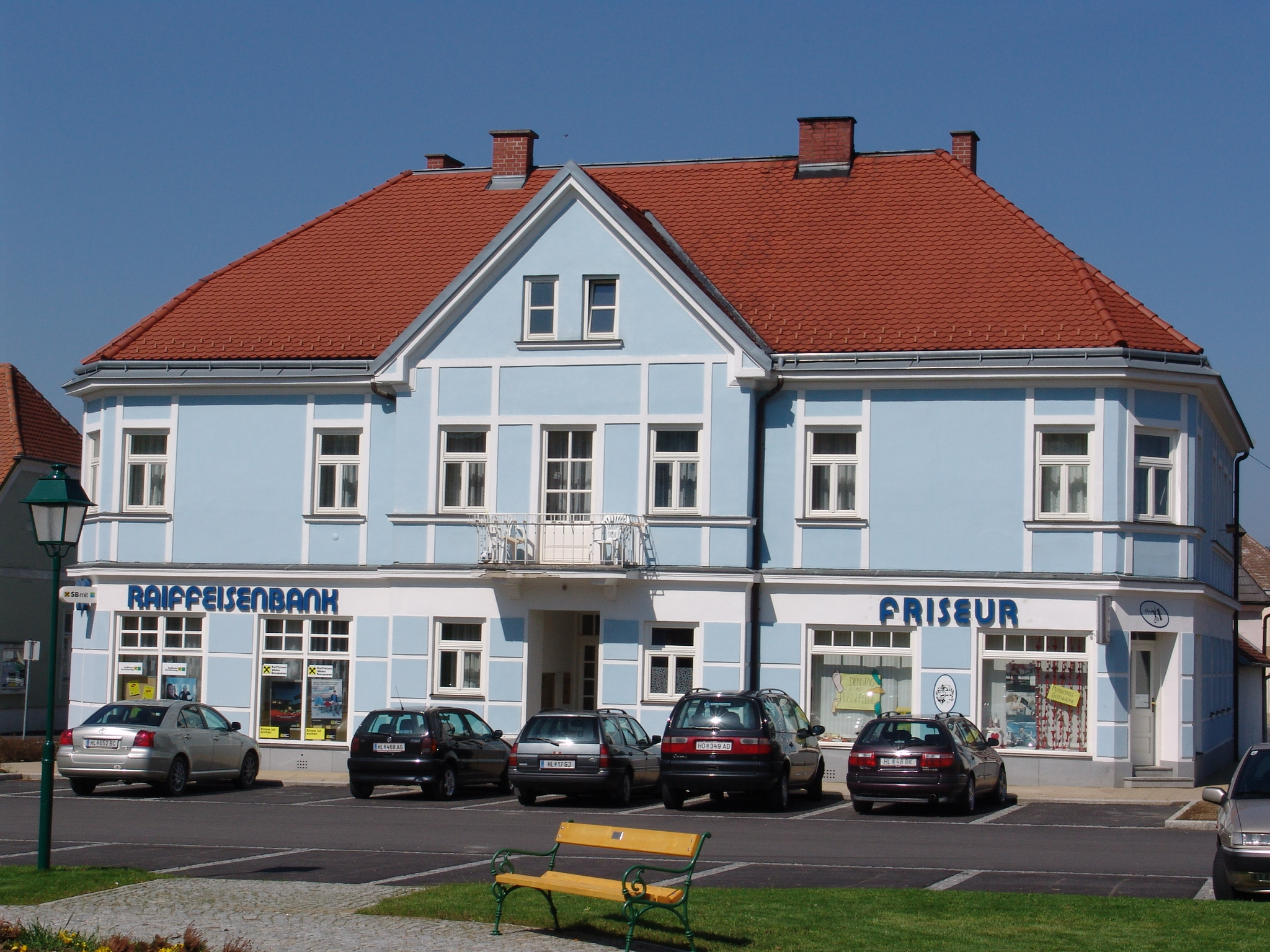 Sitzendorf Hauptplatz 21